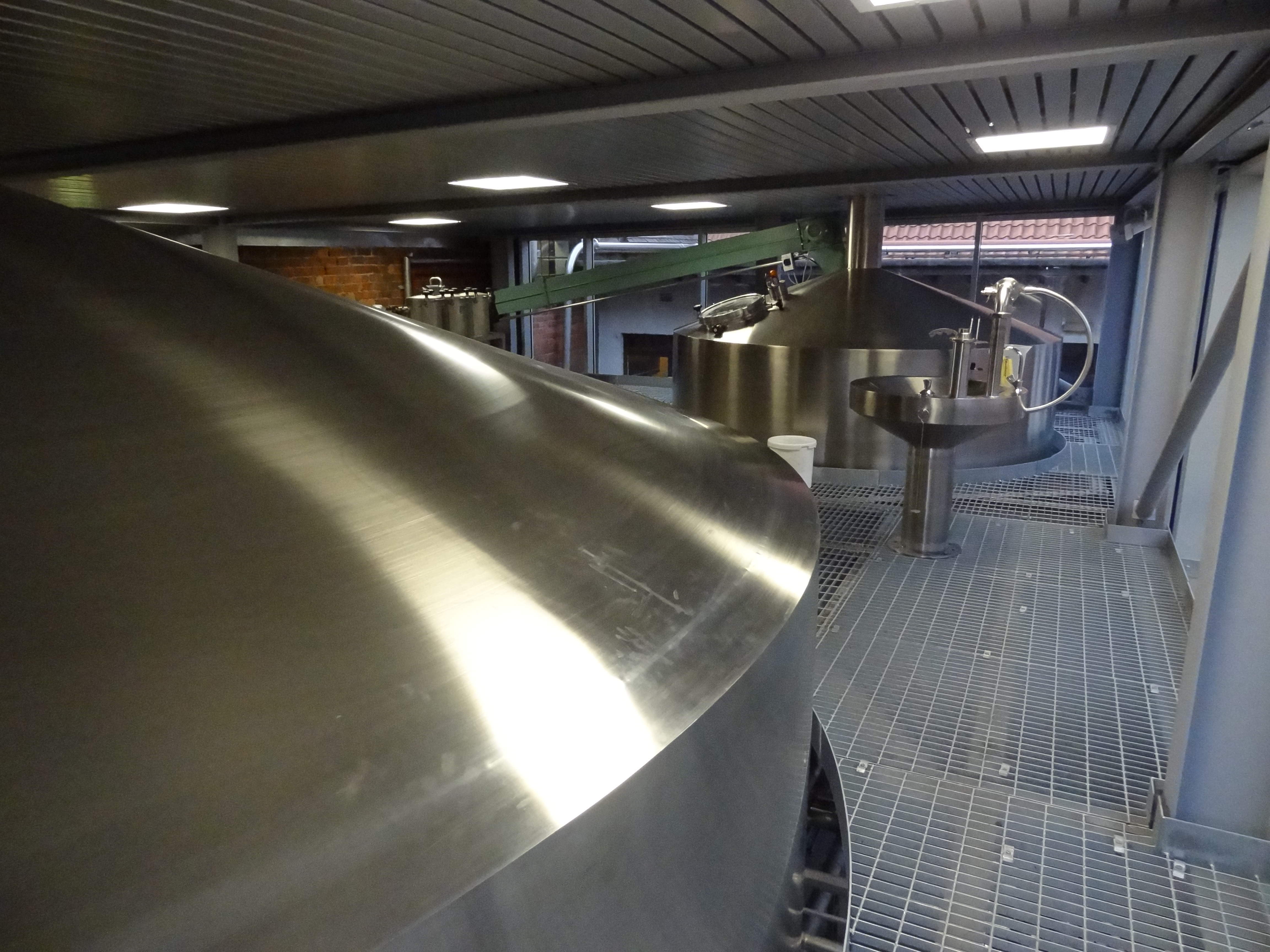 Belhaven, Sudhaus